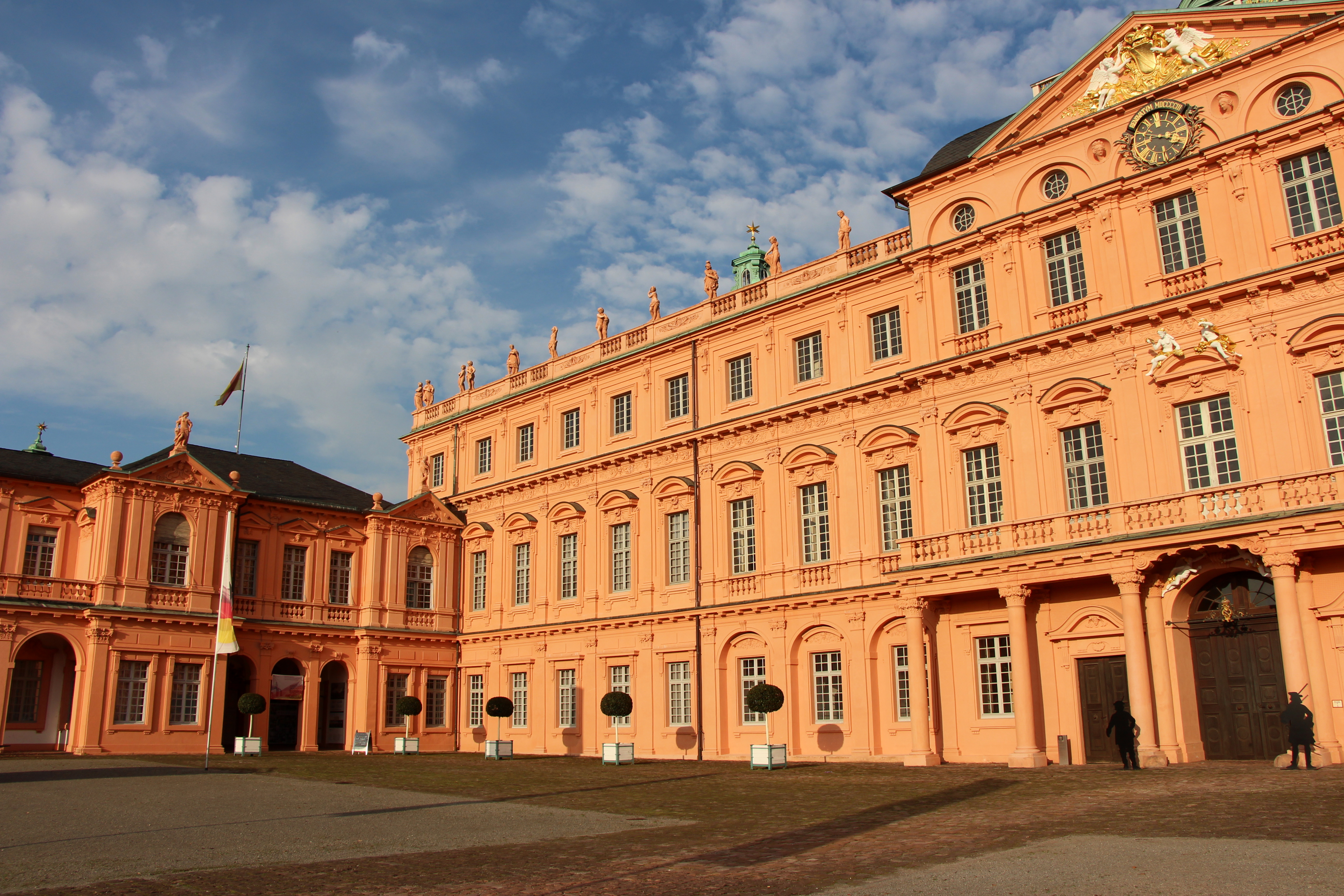 Erinnerungsstätte für die Freiheitsbewegungen in der deutschen Geschichte.